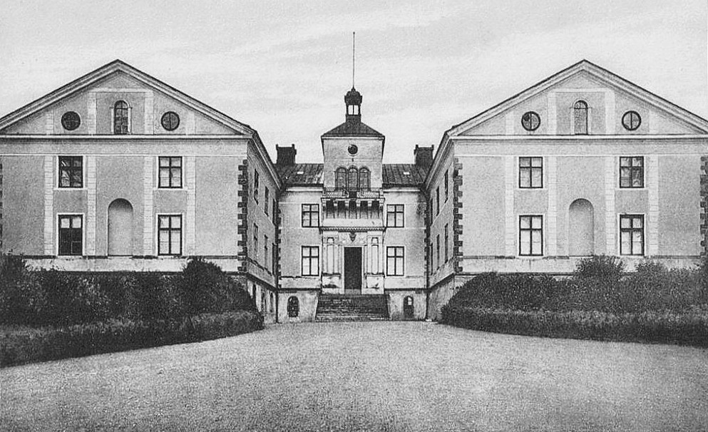 Vibyholms slott, fasad mot väster